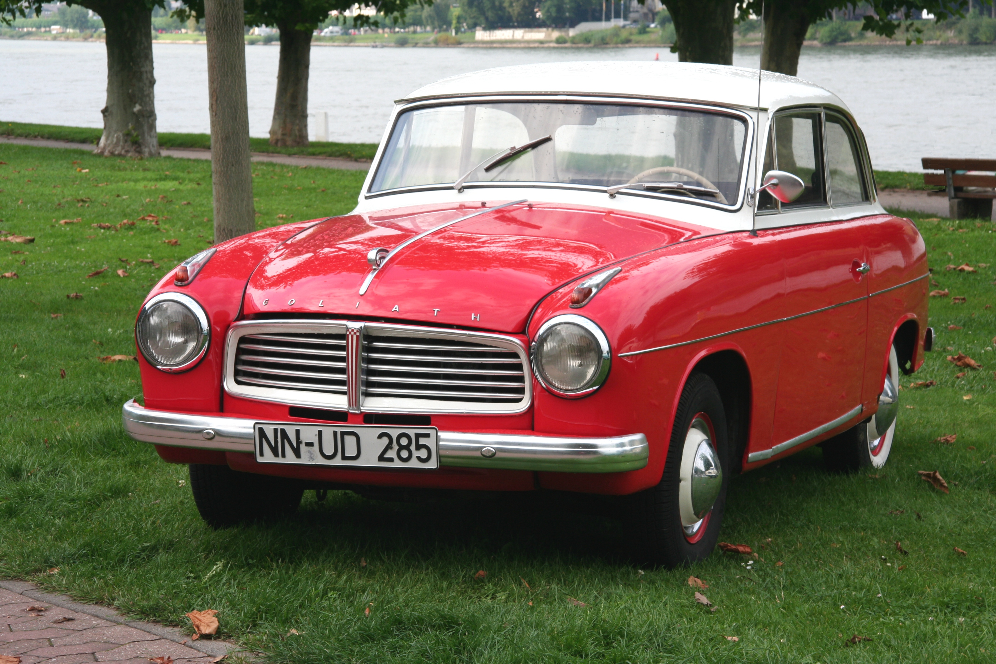 Goliath GP 1100, unter diesem Namen von Februar 1957 bis Juni 1958 gebaut, danach bis 1961 als Hansa 1100; Kennzeichen des abgebildeten Fahrzeugs verändert